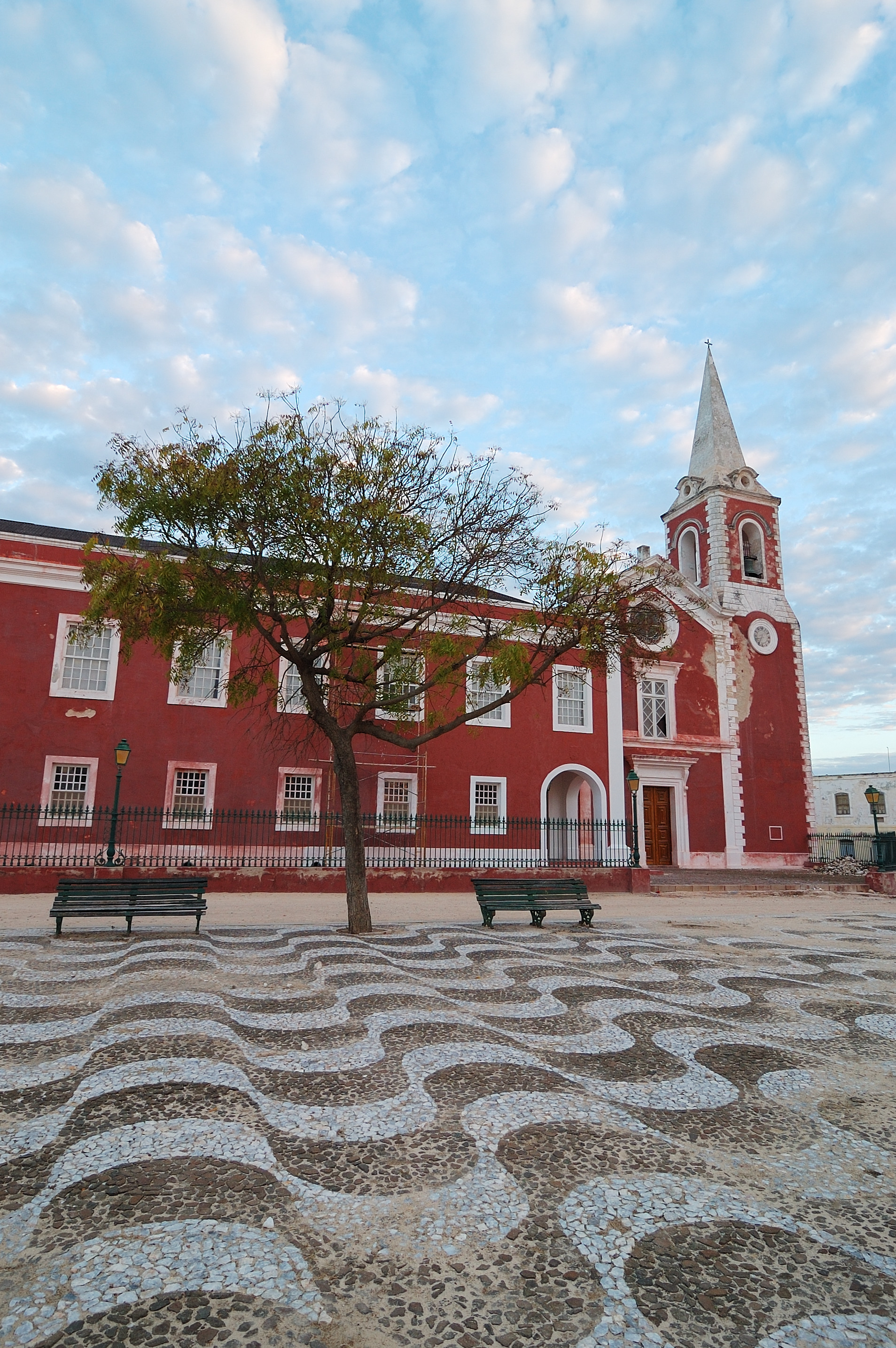 Ilha de Moçambique [2009]